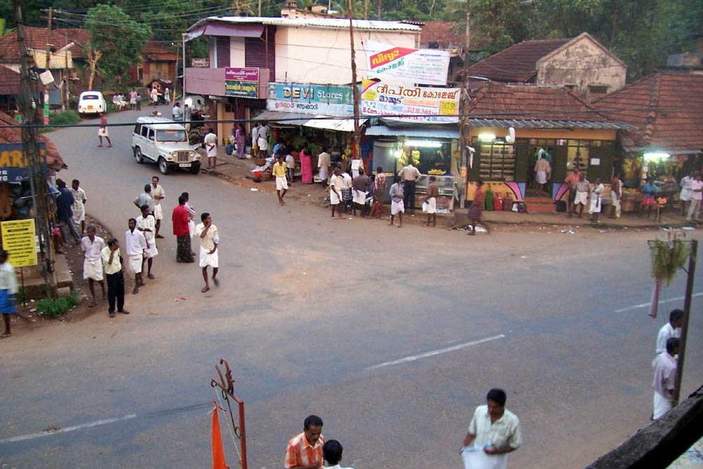 Photo-Justinpathalil